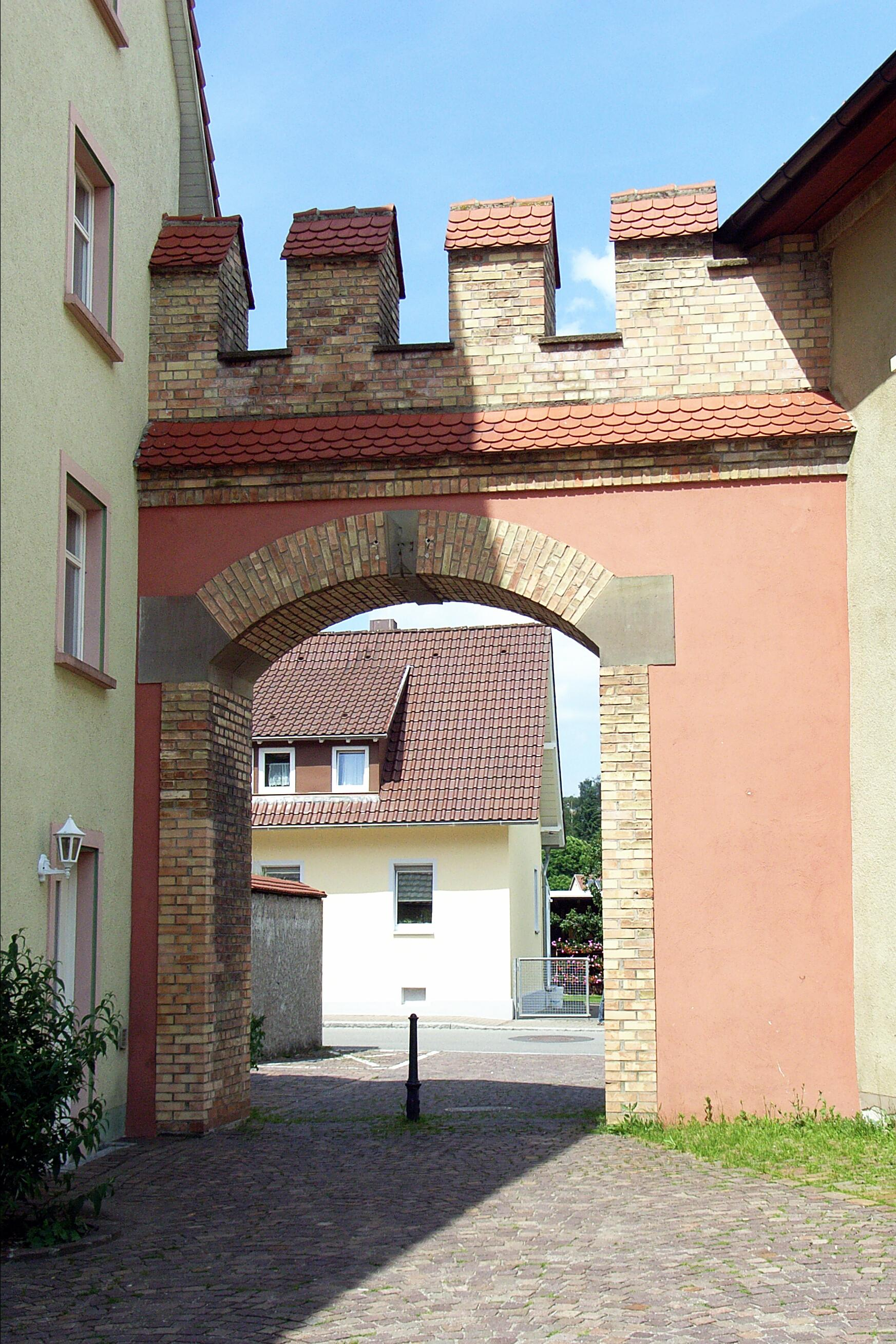 Dieses Bild zeigt einen Teil der Stadtmauer von Bräunlingen.